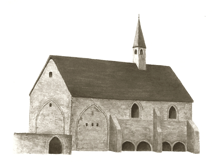 Benediktinerinnen Kloster Schaaken gegründet um 1200 - Rekonstruktion (Ausschnitt aus der Hinweistafel)